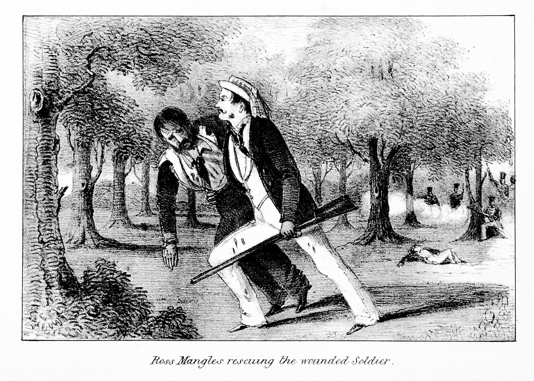 Ross Mangles